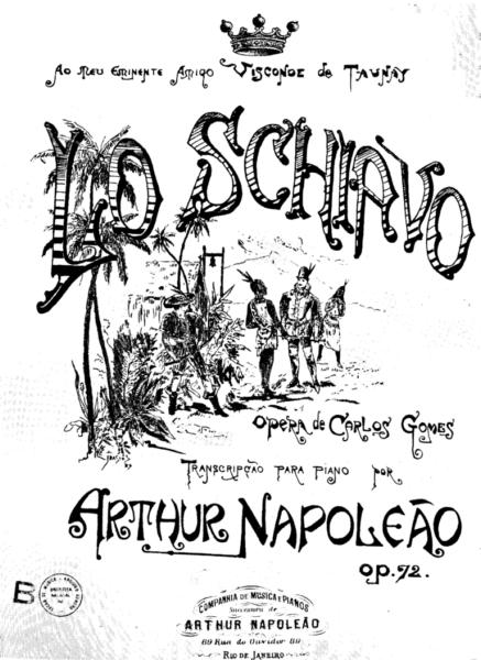 Copertina della partitura "Lo Schiavo" opera di Antônio Carlos Gomes